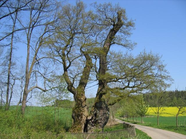 Naturdenkmal Tausendjährige Rieseneiche in Borlinghausen